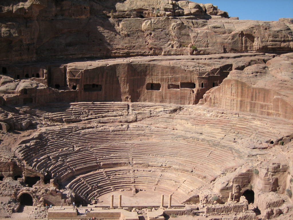 Petra, Jordan